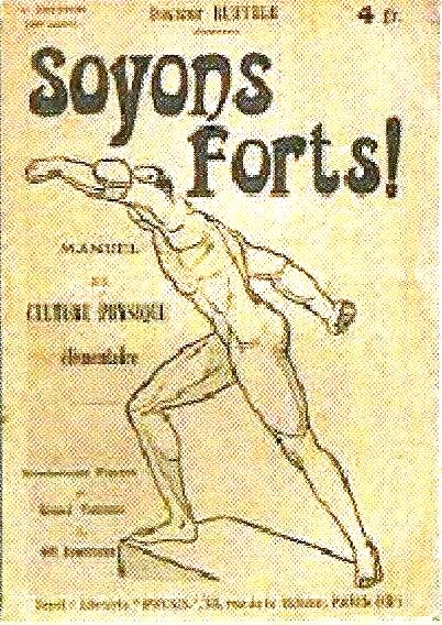 Couverture d'un ouvrage publié en 1907